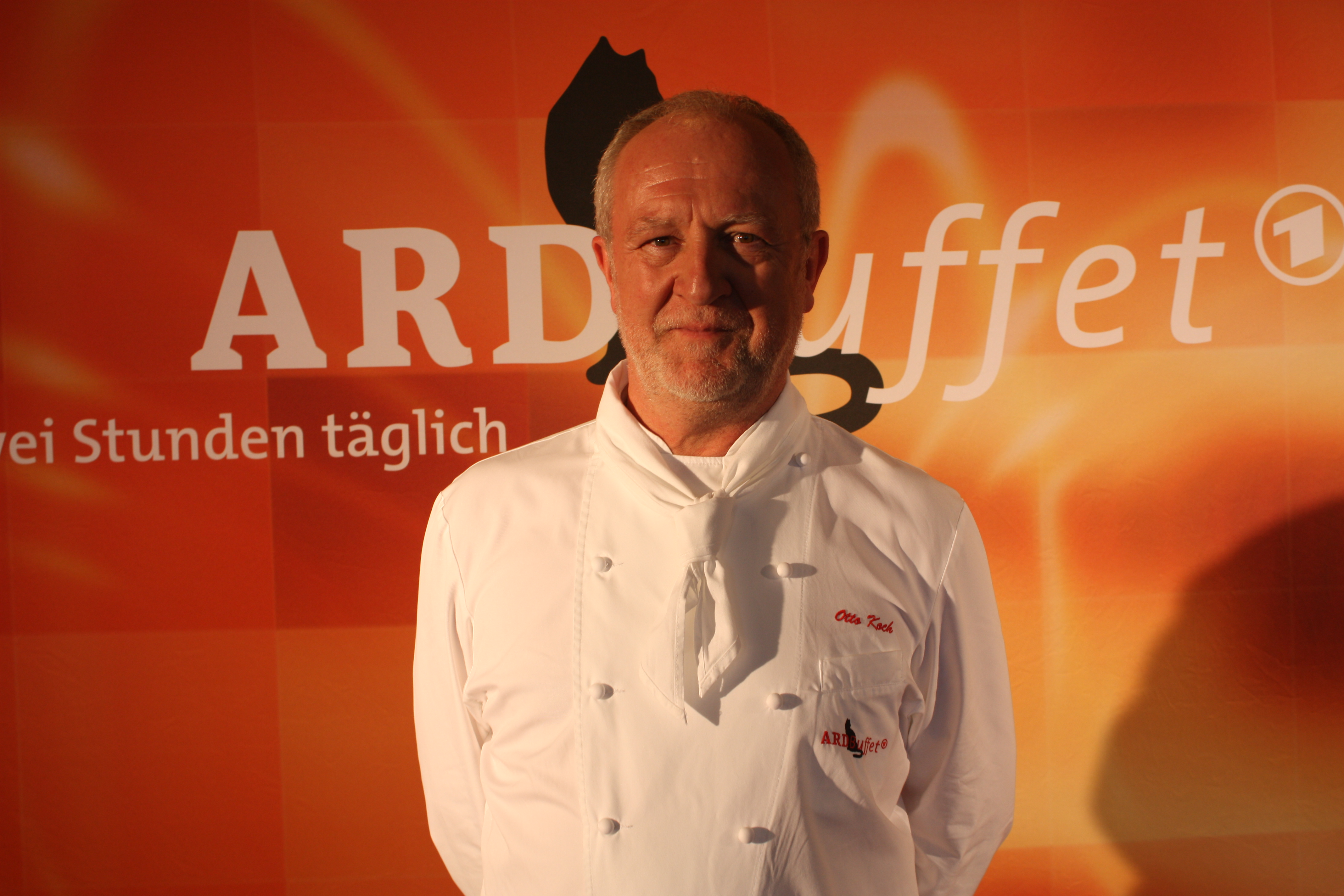 Internationale Funkausstellung 2012 , ARD-Buffet